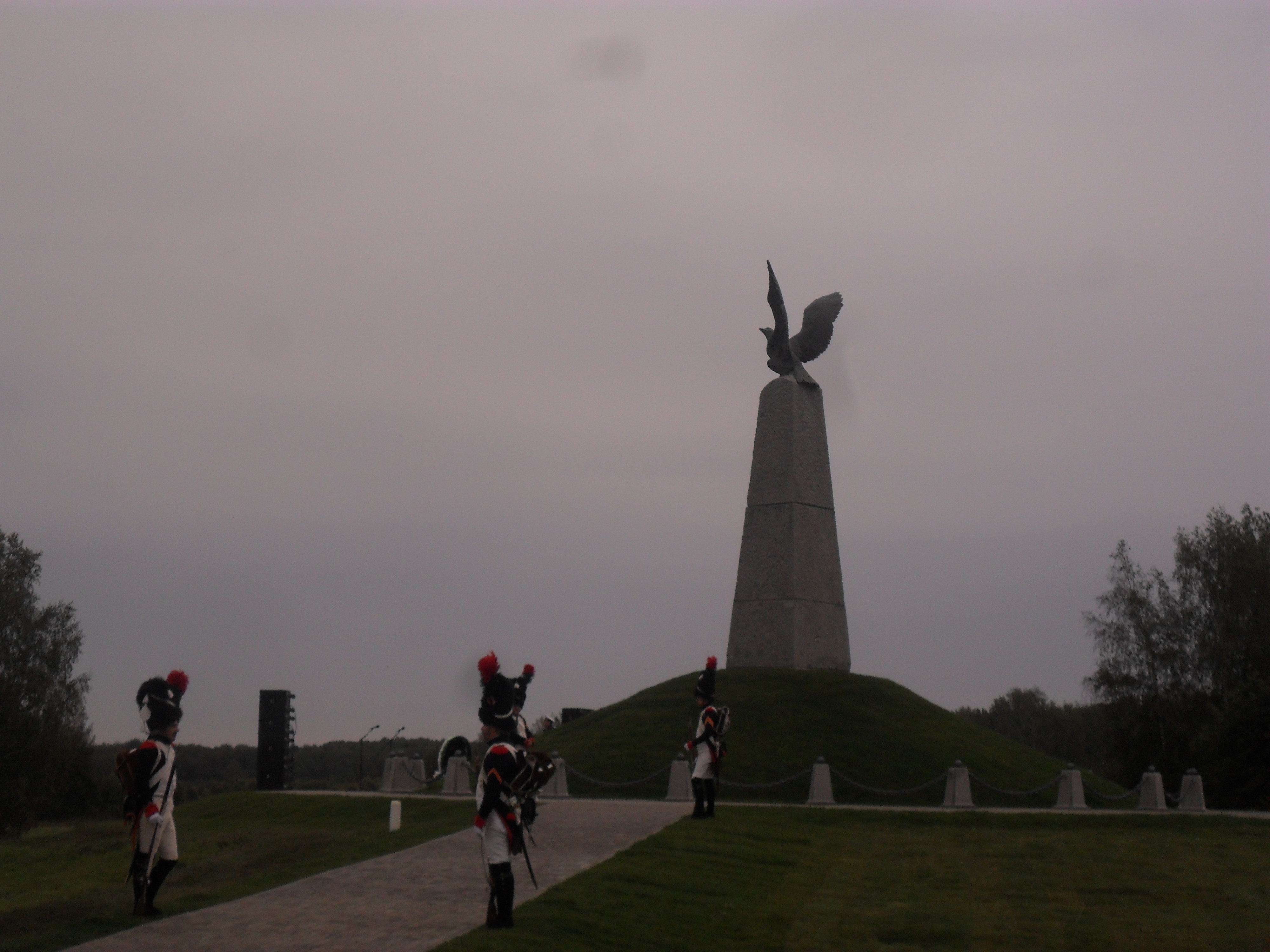 Памятник "Мёртвым великой армии" на Шевардинском редуте. Церемониал.